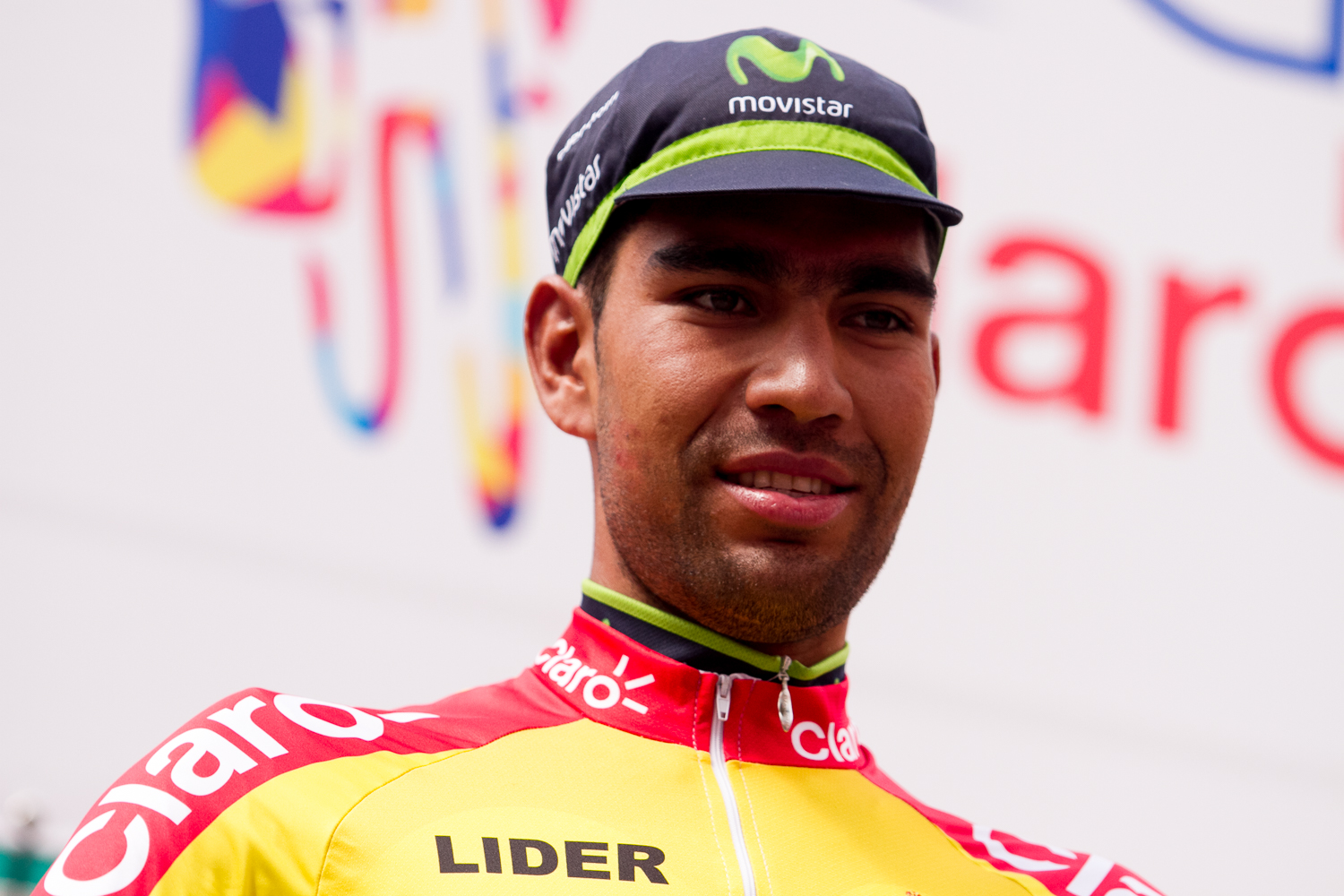 Eta.6 Clásico RCN 2015 La Dorada - Santuario (185Kms). Miércoles 30 de septiembre de 2015.